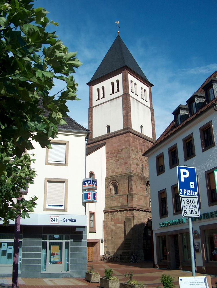 Turm der Propsteikirche in Jülich Sonstiges: nix